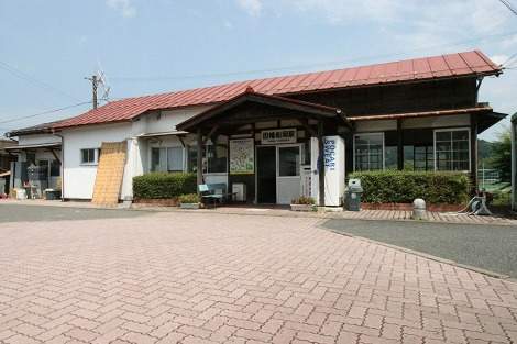 因幡船岡駅2007年撮影